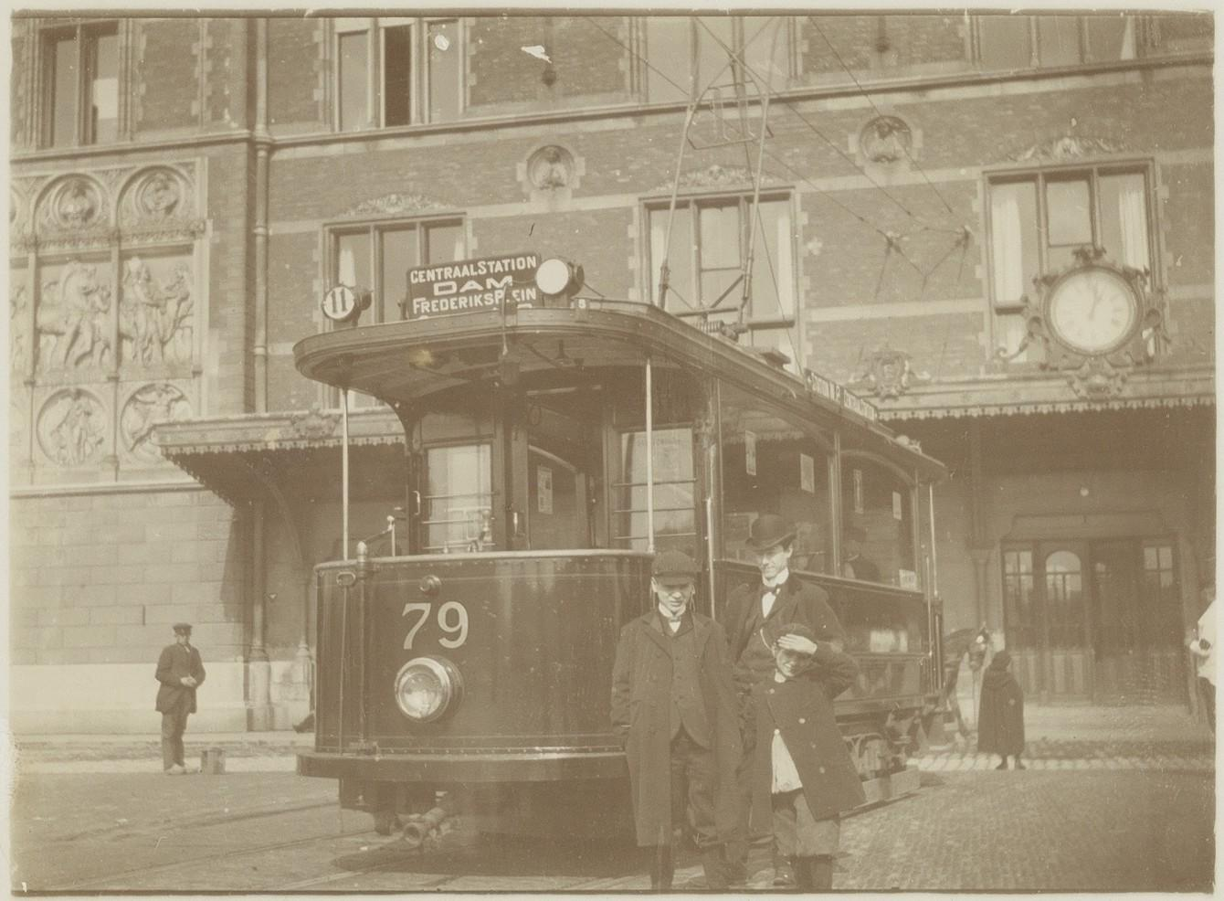 Een electrische tram van lijn 11 (motorwagen 79) vóór de hoofdingang van het Centraal Station aan het Stationsplein Documenttype foto Vervaardiger Onbekend Anoniem Collectie Collectie Stadsarchief Amsterdam: foto-afdrukken Datering 1905 ca. Geografische naam Stationsplein Gebouw Centraal Station Inventarissen Afbeeldingsbestand ANWR00114000001